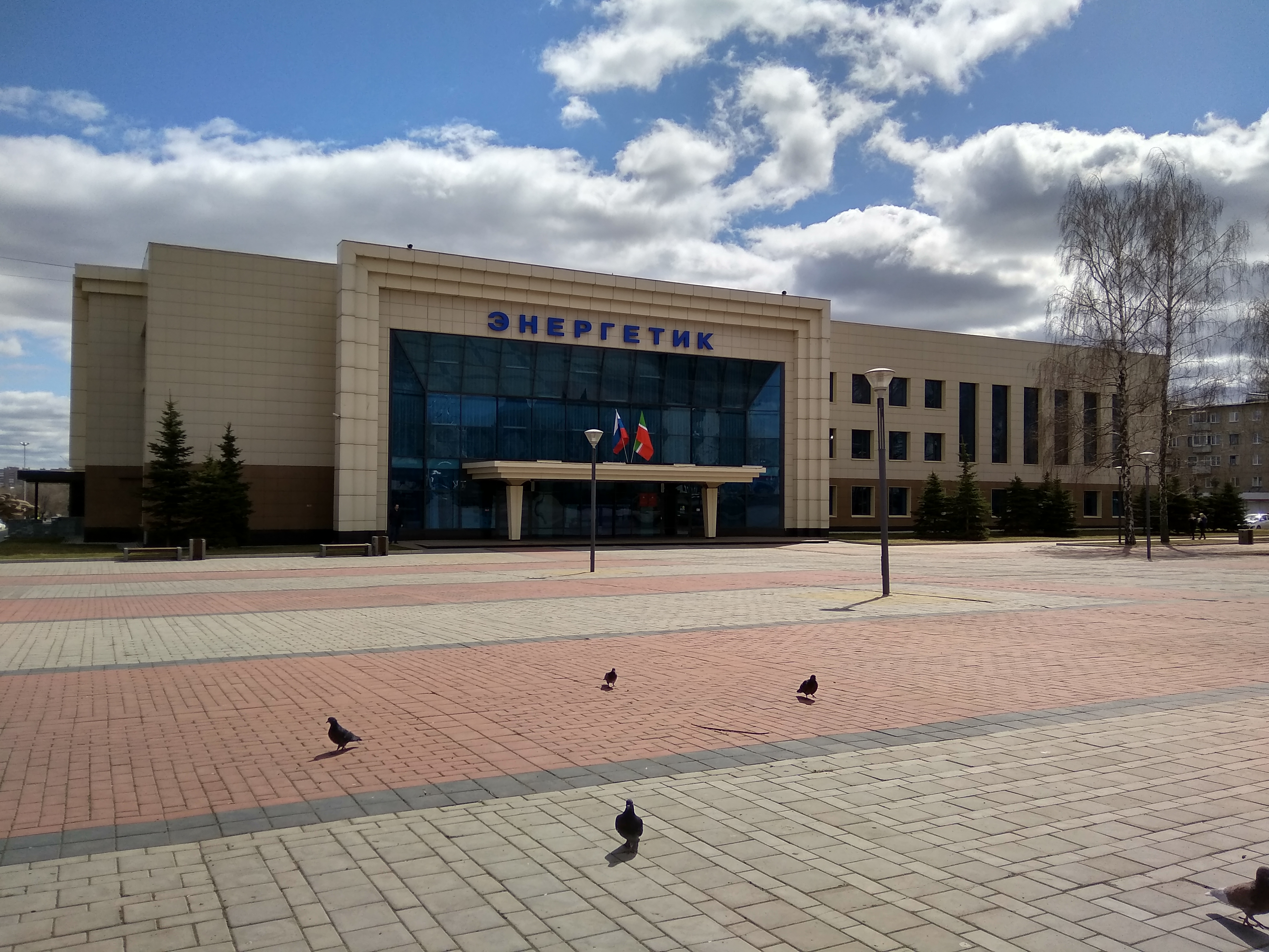 Дворец культуры "Энергетик" в Набережных Челнах.